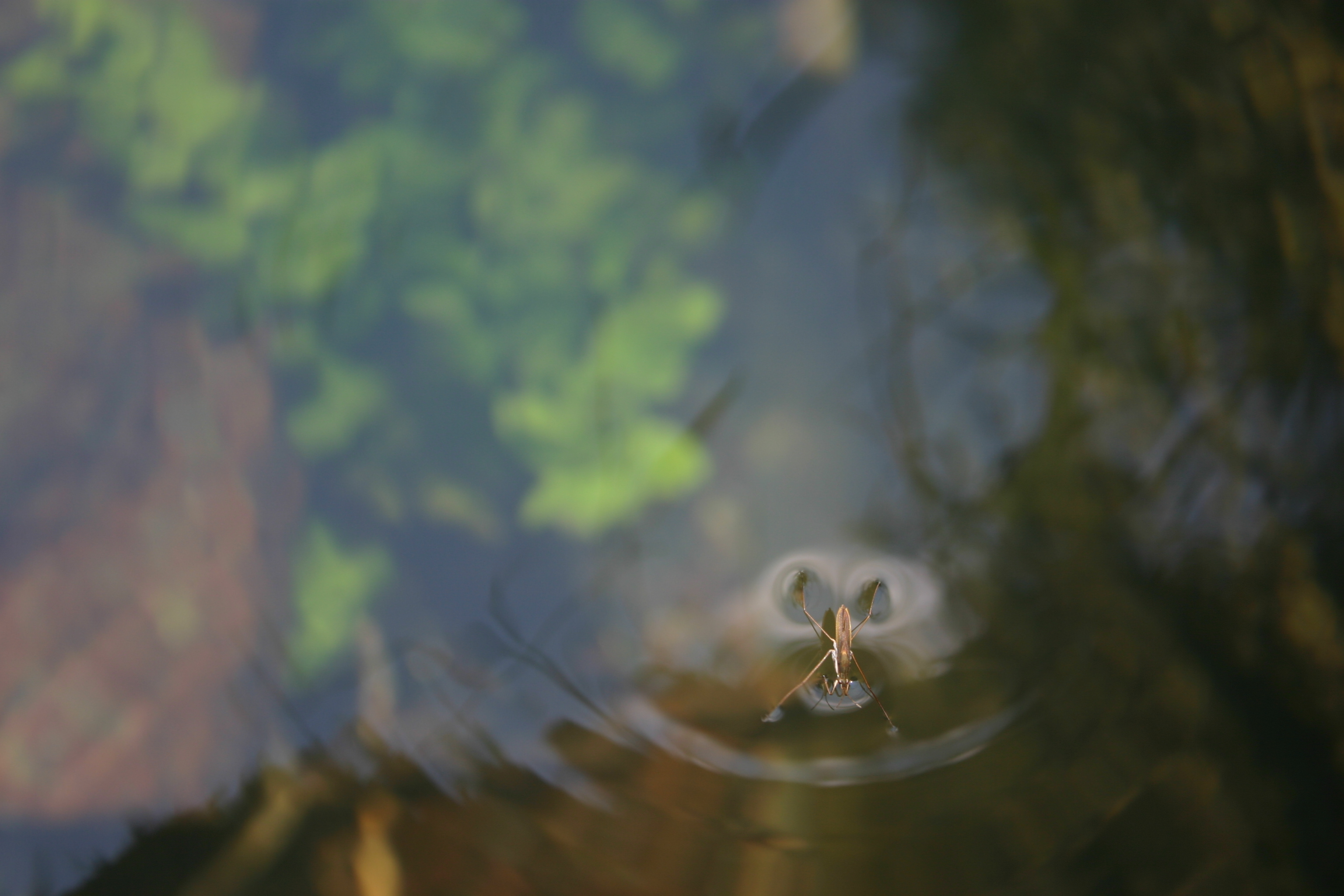 Српски (ћирилица): Ово је фотографија заштићеног природног добра у Србији под шифром: ПП18 This is a a photo of a natural area in Serbia with ID: ПП18 Инсект који хода по површини воде захваљујући ножицама које имају хидрофобне длачице и површинском напону